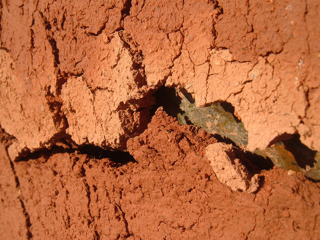 Bom, era uma casa de barro. Eu não tinha o que fazer então resolvir fazer um macro da textura :D